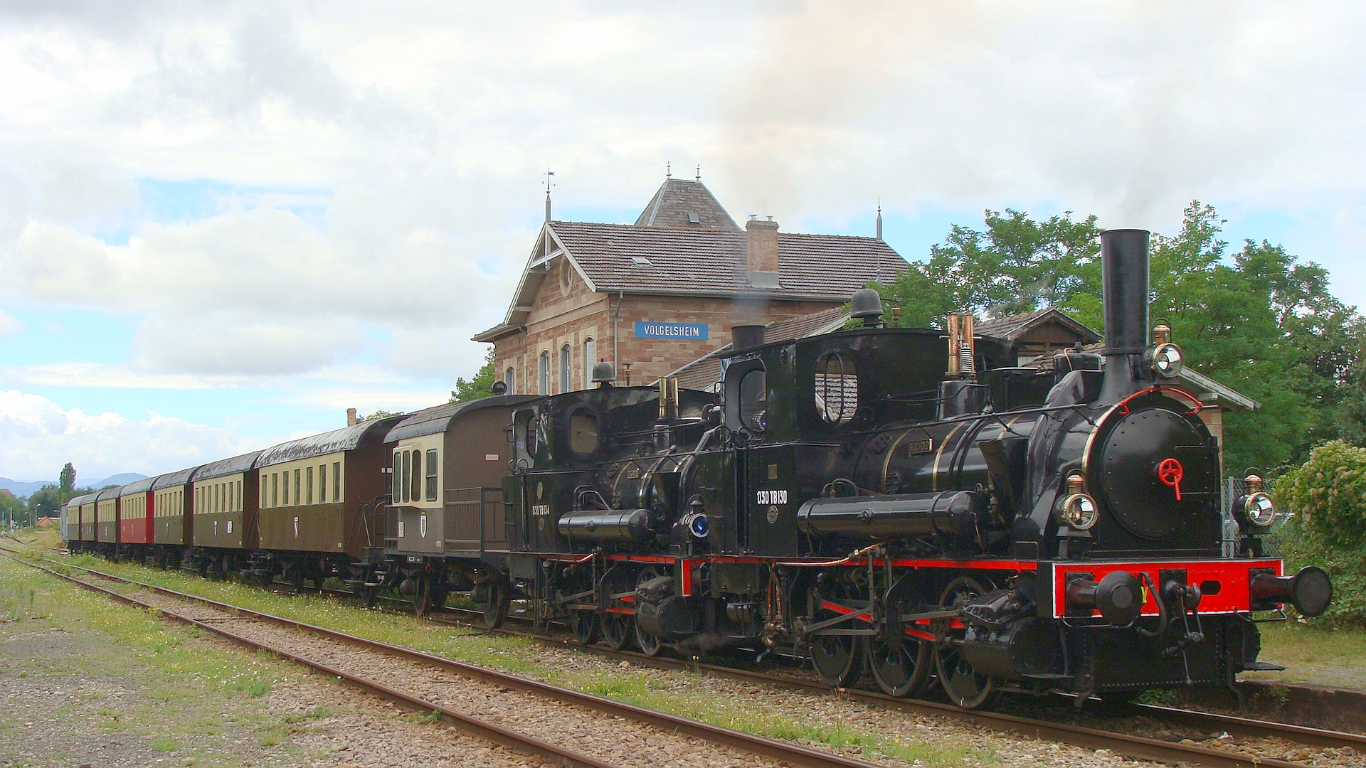 Fraîchement restaurée, la 030 TB 130 "Berthold" attend le départ du train avec sa petite soeur "Théodor", la 030 TB 134